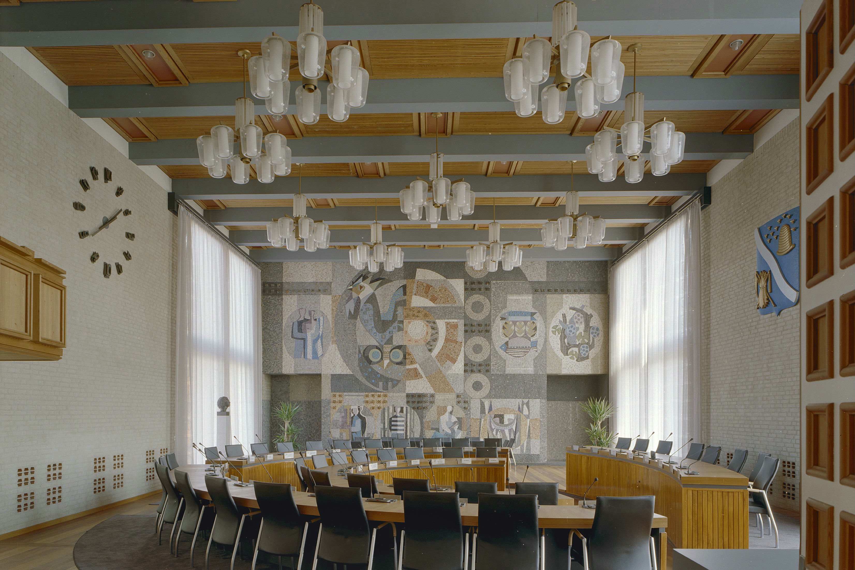 Stadhuis: Interieur raadzaal met mozaiëkwand (opmerking: Gefotografeerd voor Toonbeelden van de Wederopbouw)